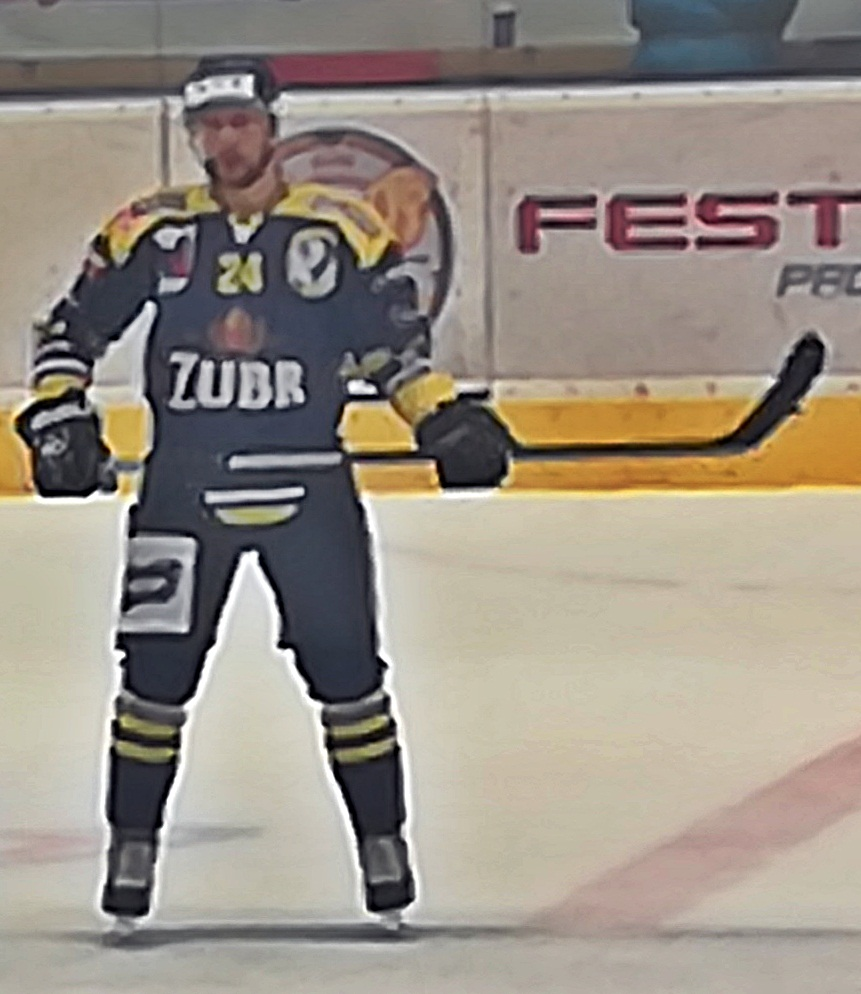 Tomáš Doležal, HC Zubr Přerov 2017/18